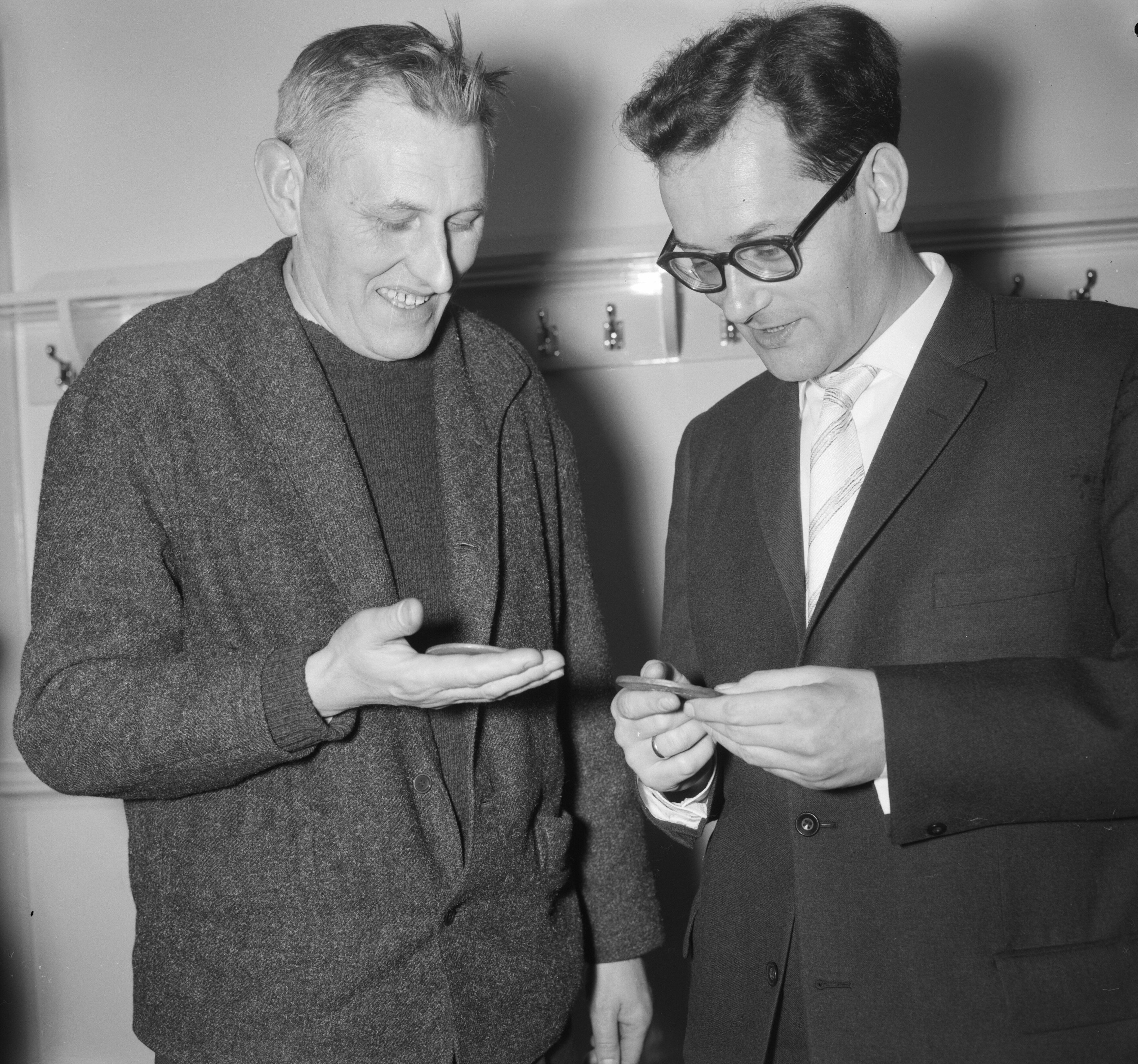 Uitreiking prijzen kunstenaarsverzet in het Concertgebouw te Amsterdam, links Wally Elenbaas en rechts Alfred Kossmann. 19 februari 1961